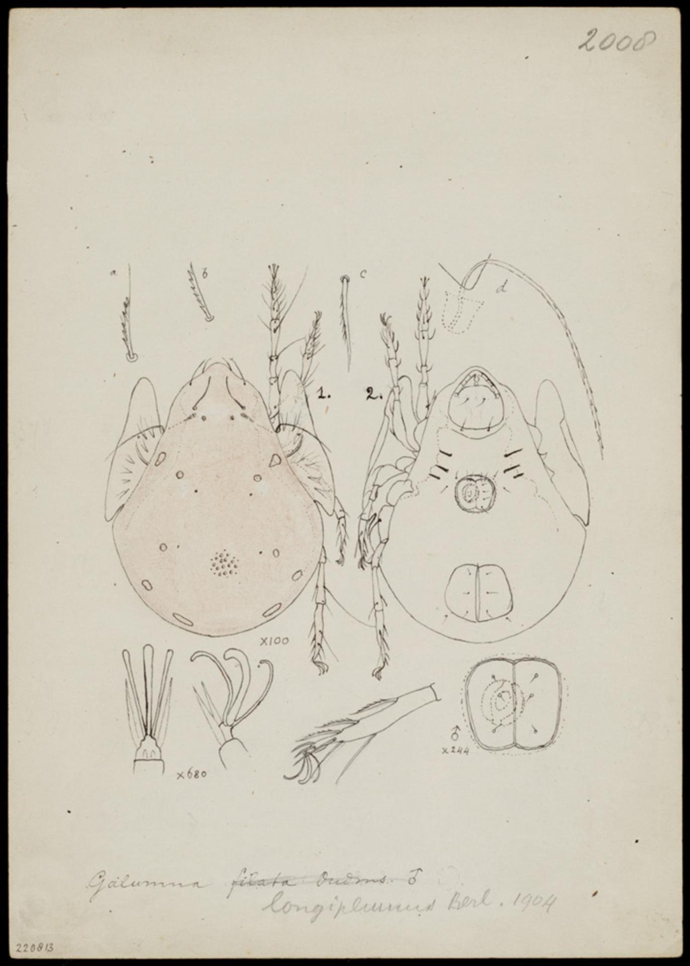 Galumna longiplumus (Berlese)